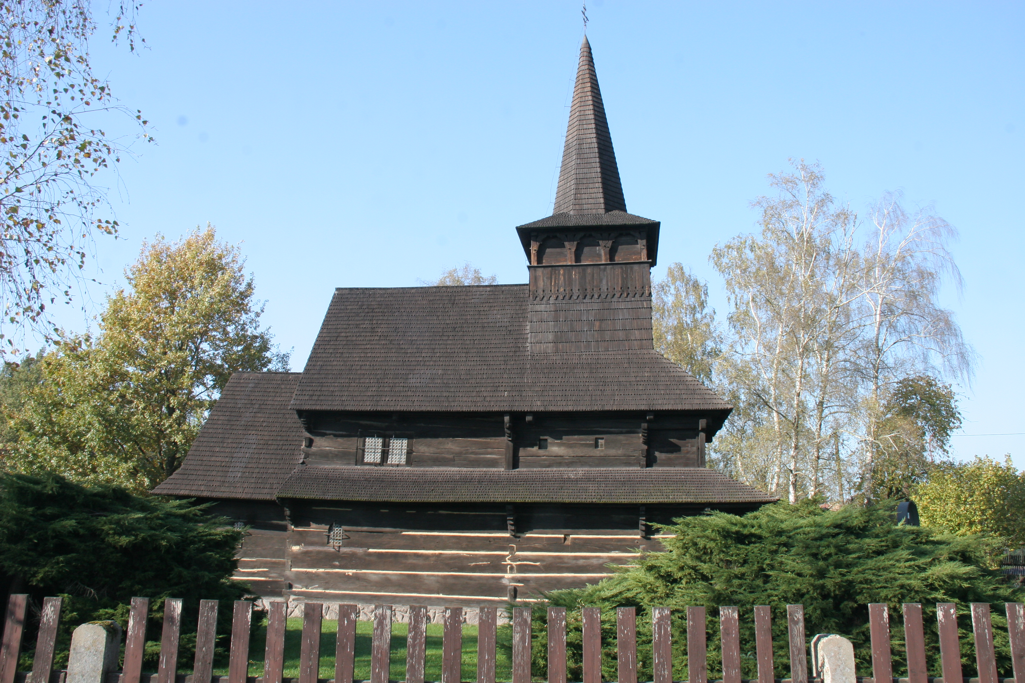 Kostel CČSH z Velké Kopaně, Dobříkov.